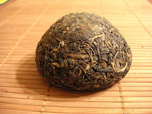 Xiaguan 1992 raw pu-erh tuocha.